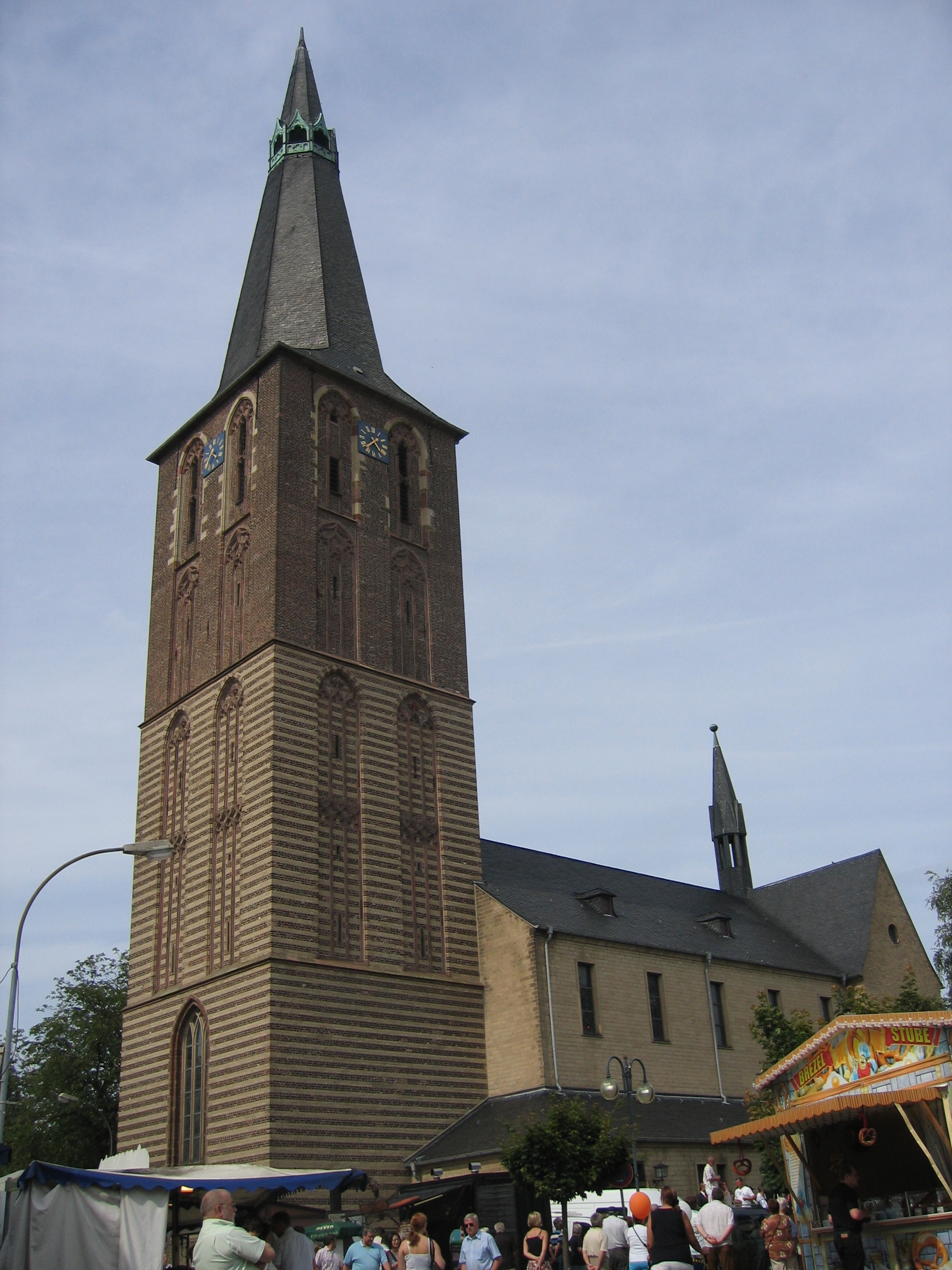 Die Stiftskirche in Kerpen Ortsmitte